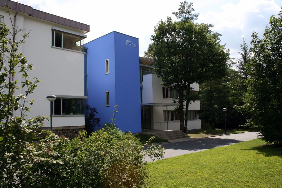 Berufsbildungswerk Sachsen, Wohnheim, Physiotherapie & Azubi-Betreuung, Hellerhofstraße 21, 01129 Dresden, 2007